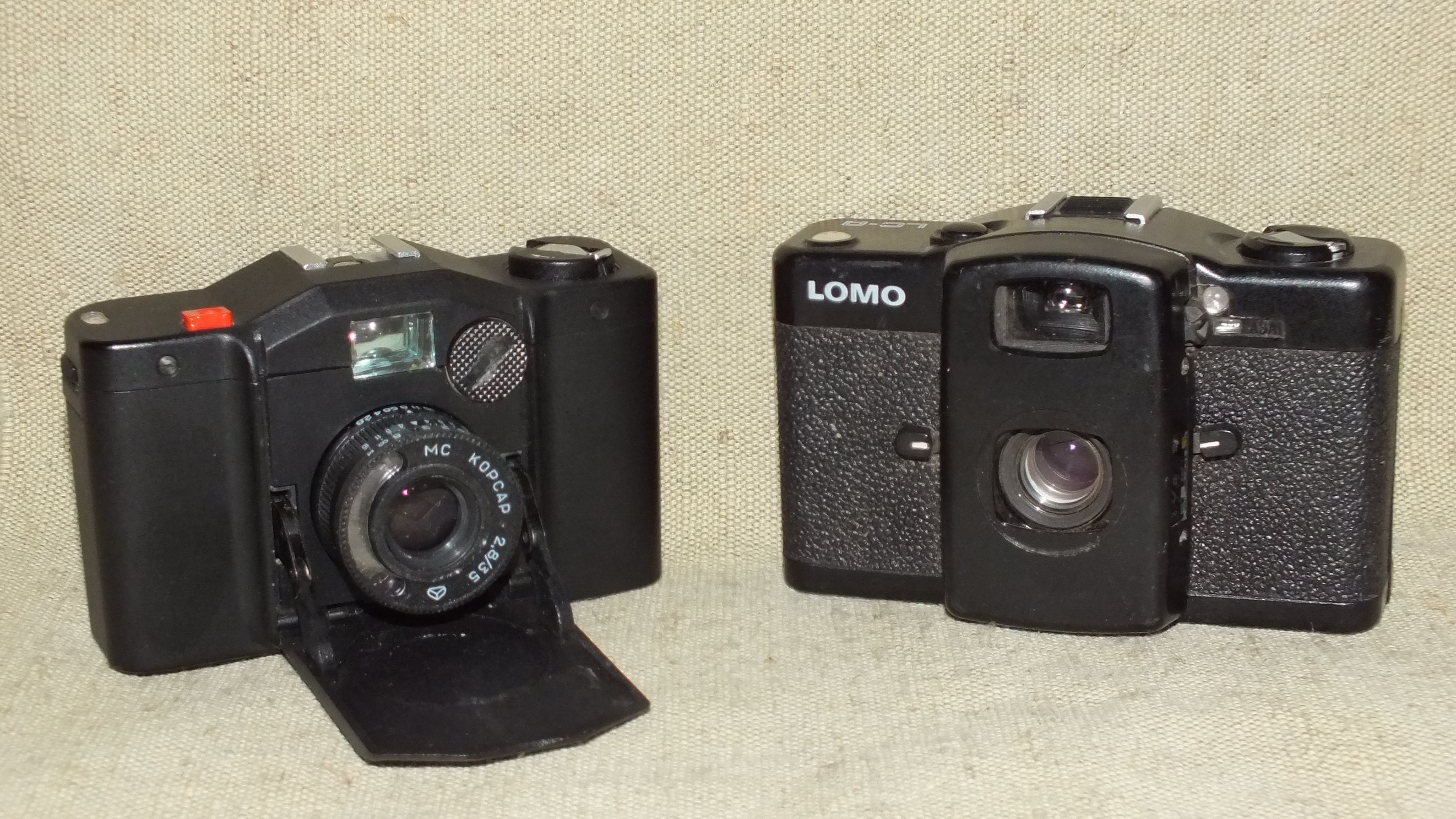 Ломо-Компакт и Киев-35